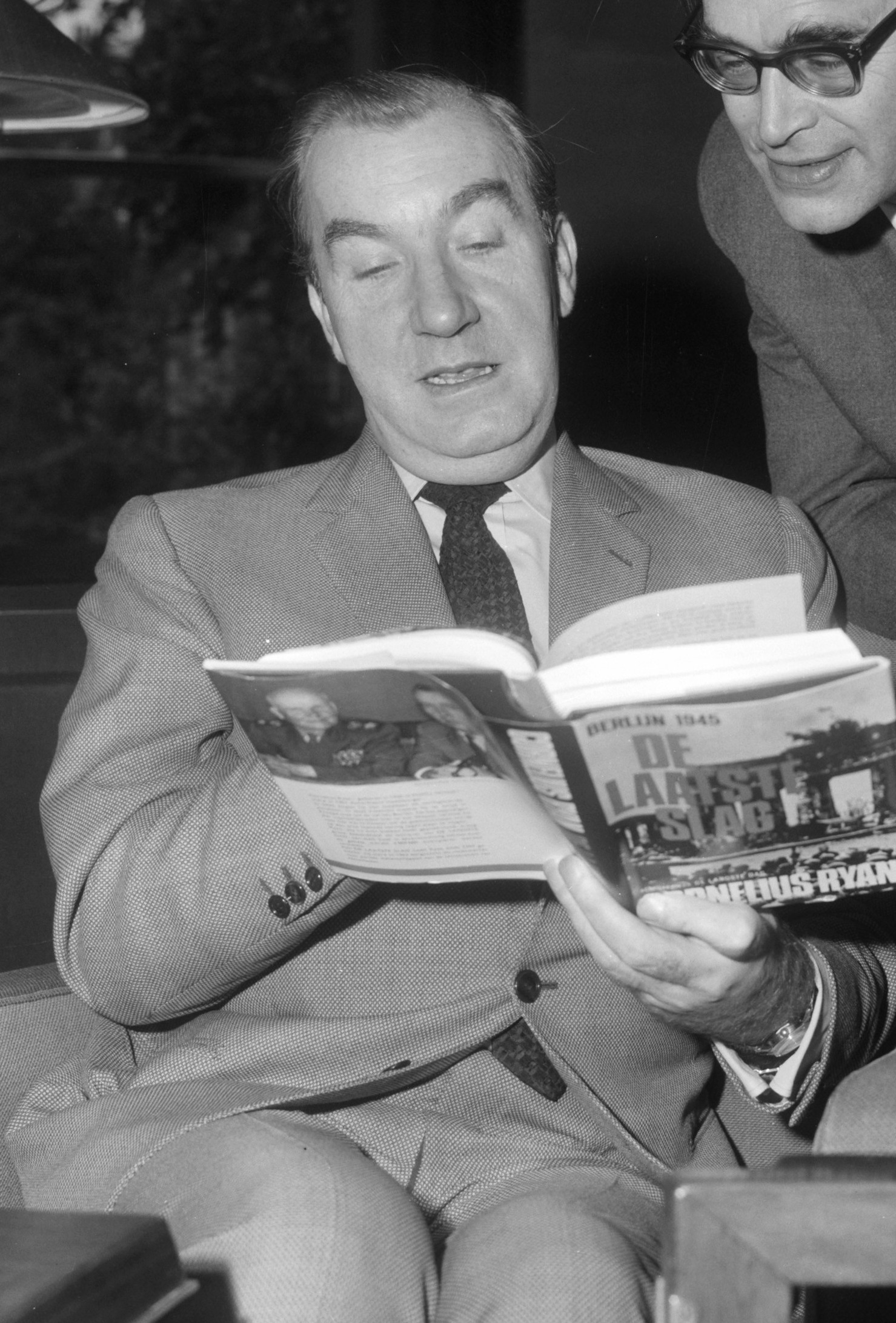 De Iers-Amerikaans journalist en historicus Cornelius Ryan met rechts de schrijver Godfried Bomans